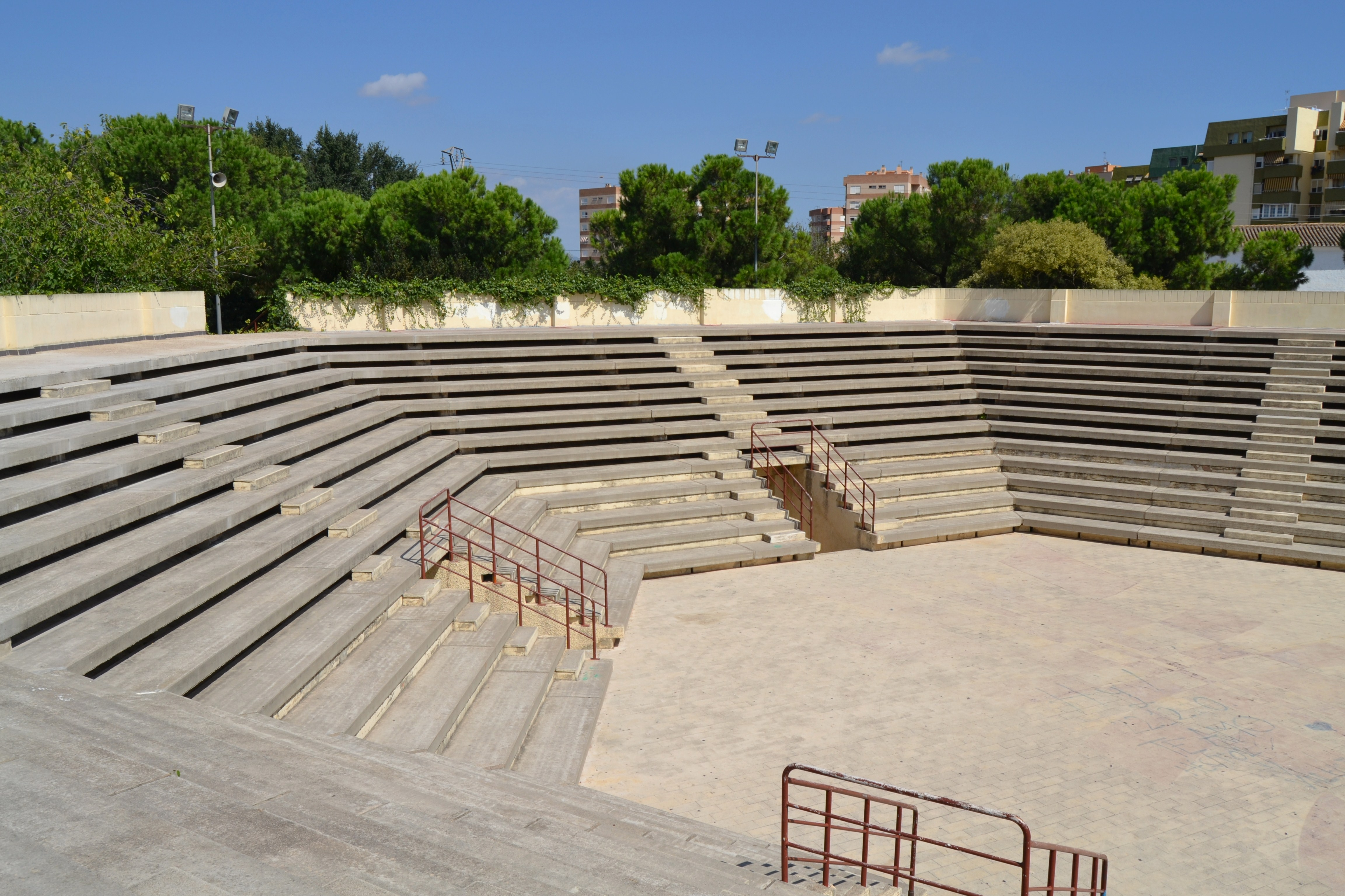 Parc de Benicalap, teatre a l'aire lliure.